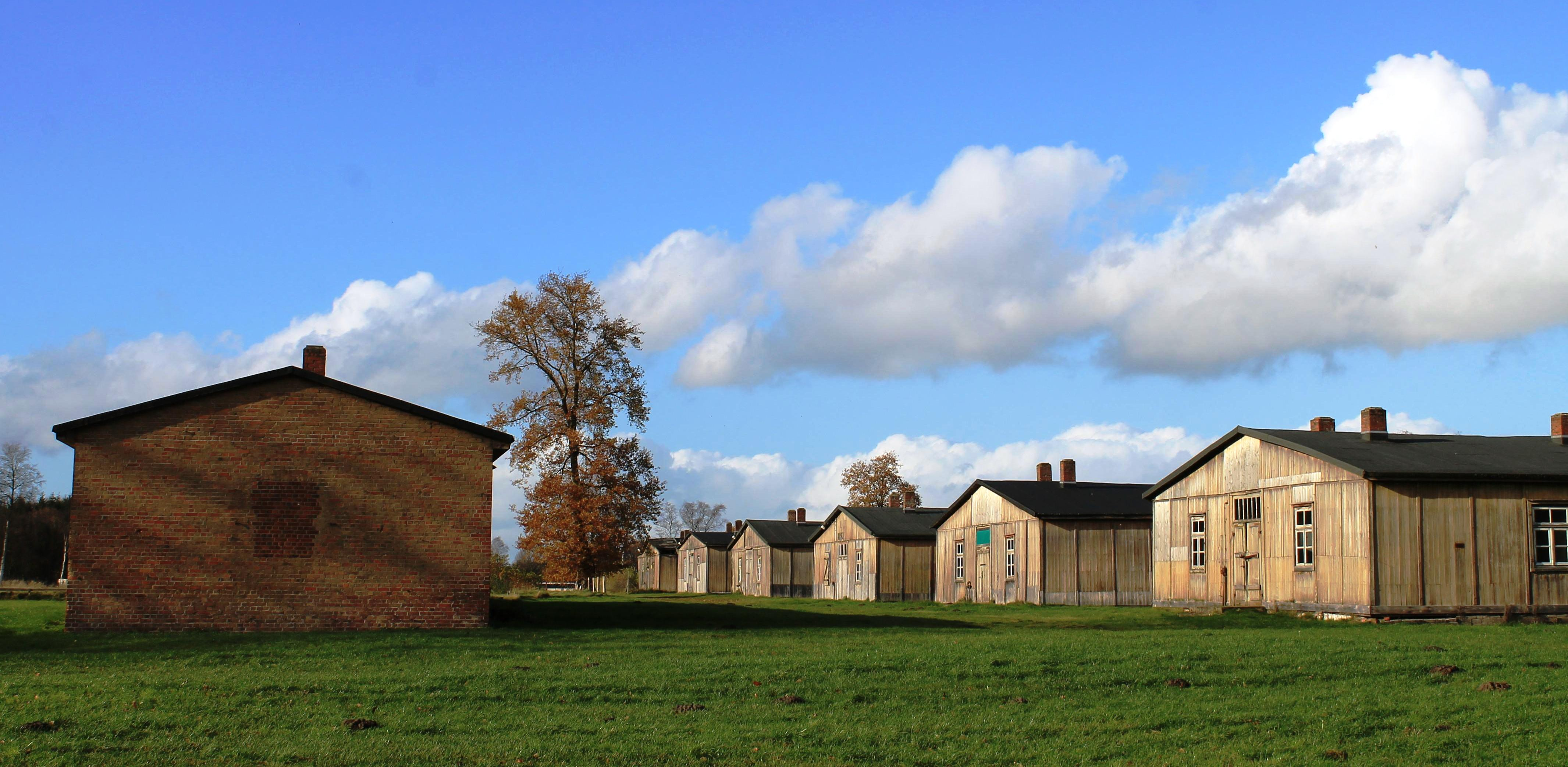 Gedenkstätte Lager Sandbostel, Lageransicht von der Seite